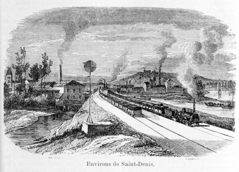 La station de Saint-Denis, du chemin de fer du Nord, vue artistique dessinée puis gravée.